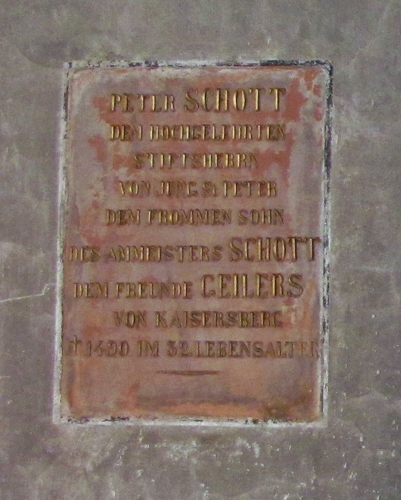 Gedenktafel für Peter Schott den Jüngeren, Straßburg, Jung St. Peter